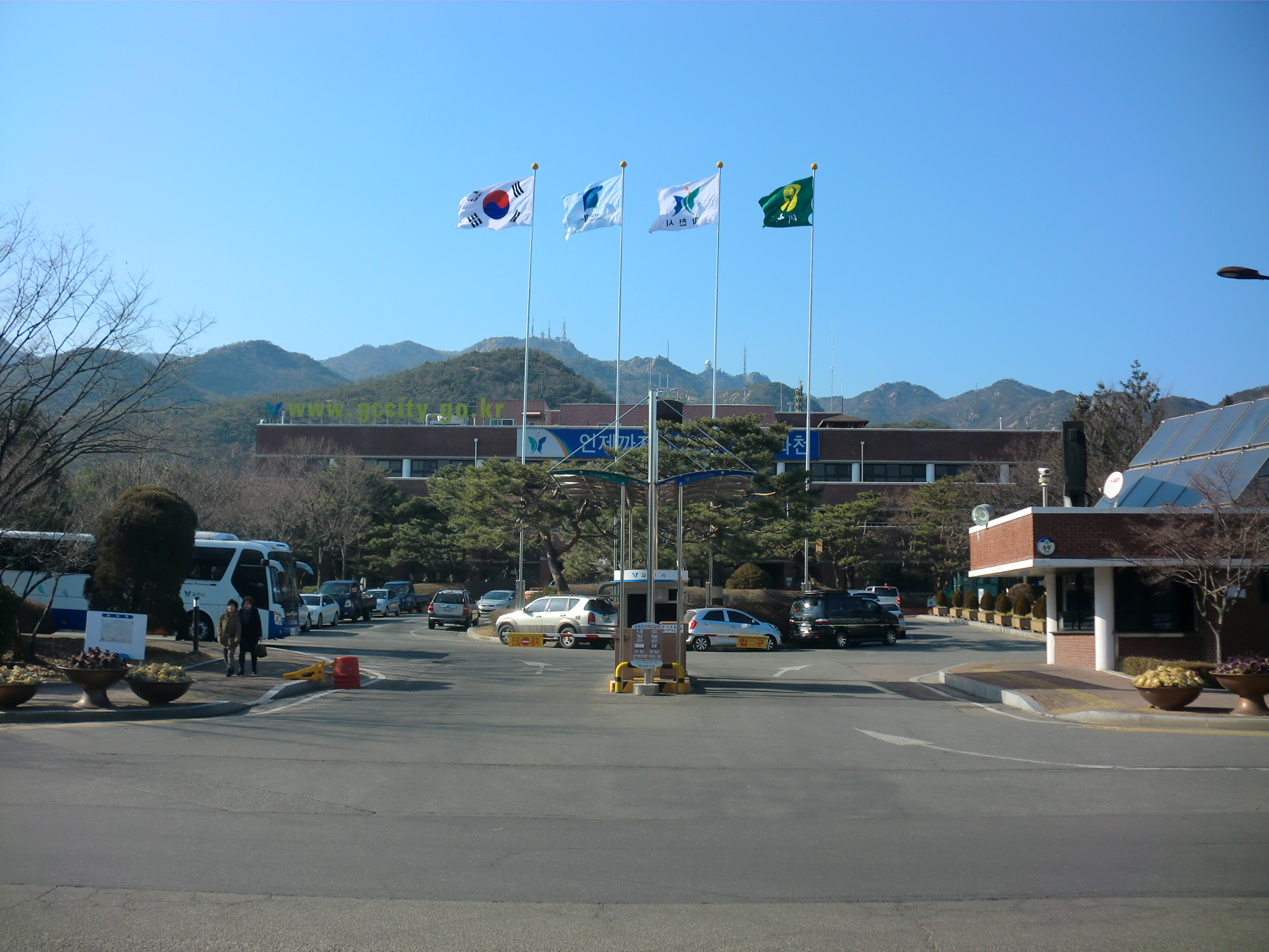 경기도 과천시에 있는 과천시청